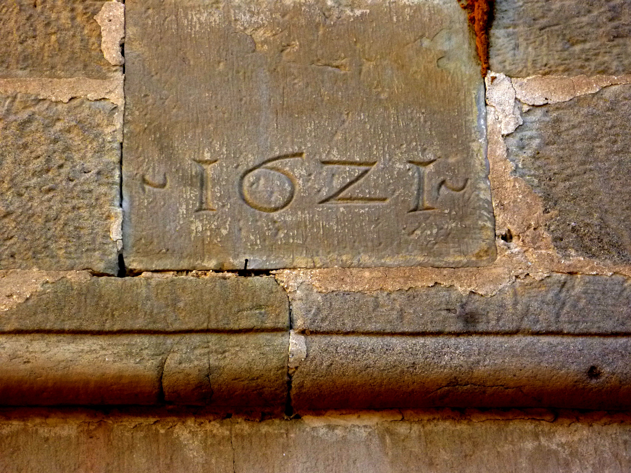 Església de Sant Esteve del Pujol de Planès (Montmajor): llinda del portal This is a a photo of a natural area in Catalonia, Spain, with id: ES510162